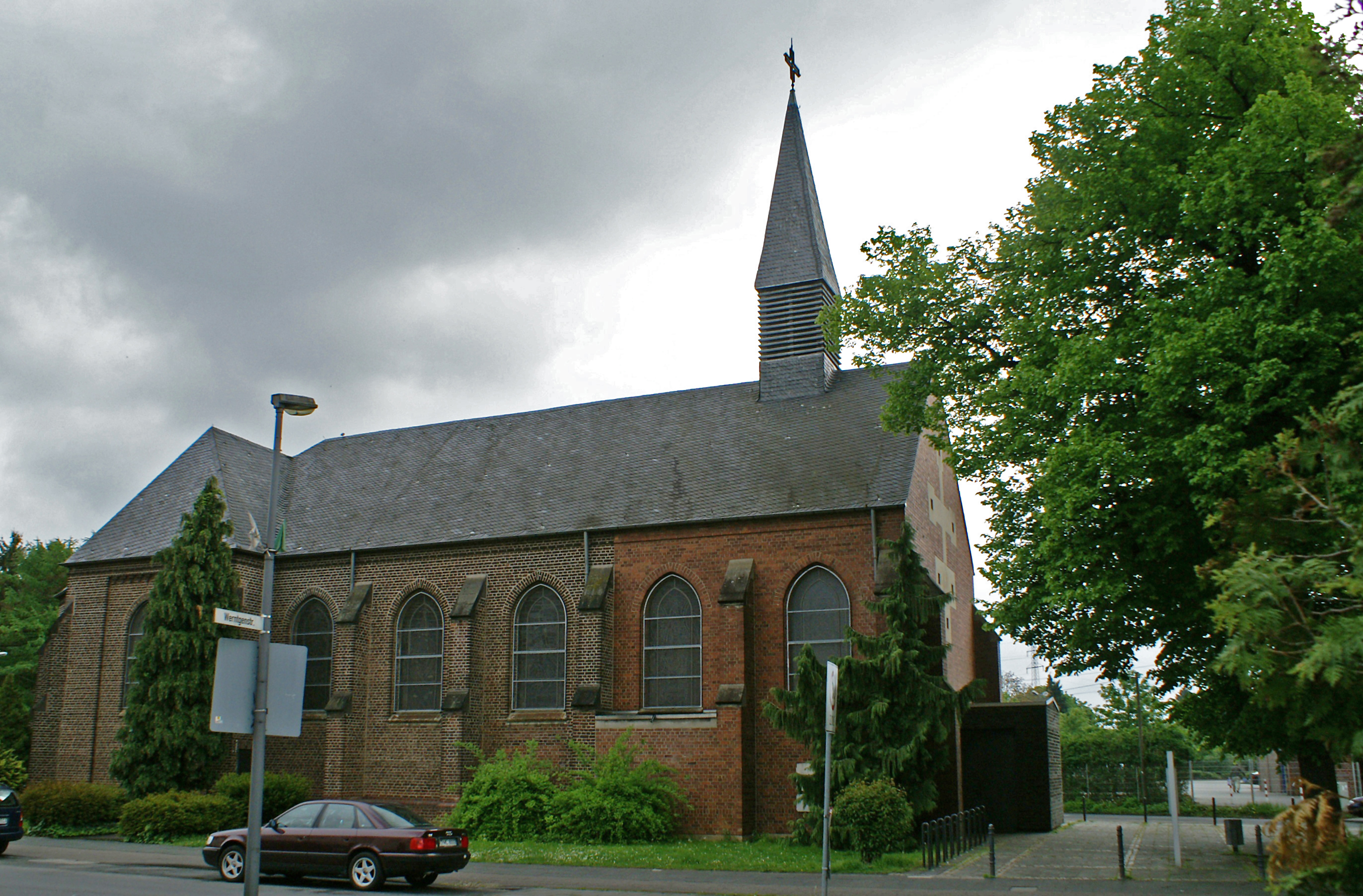 Sankt Servatius in Köln-Ostheim